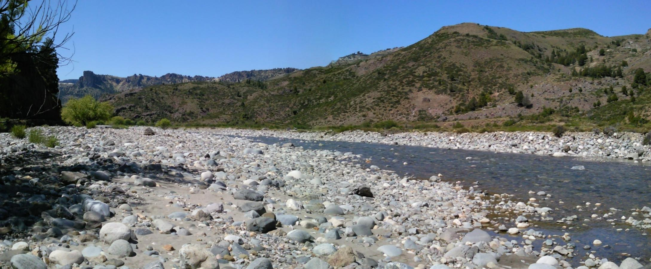 Cuyin Manzano, Los Lagos, Neuquén, Argentina